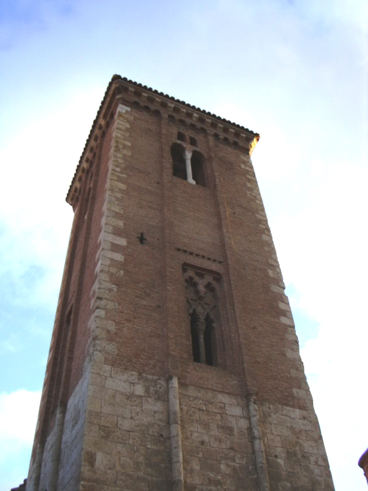 Daroca - Torre mudéjar de la Iglesia de Santo Domingo